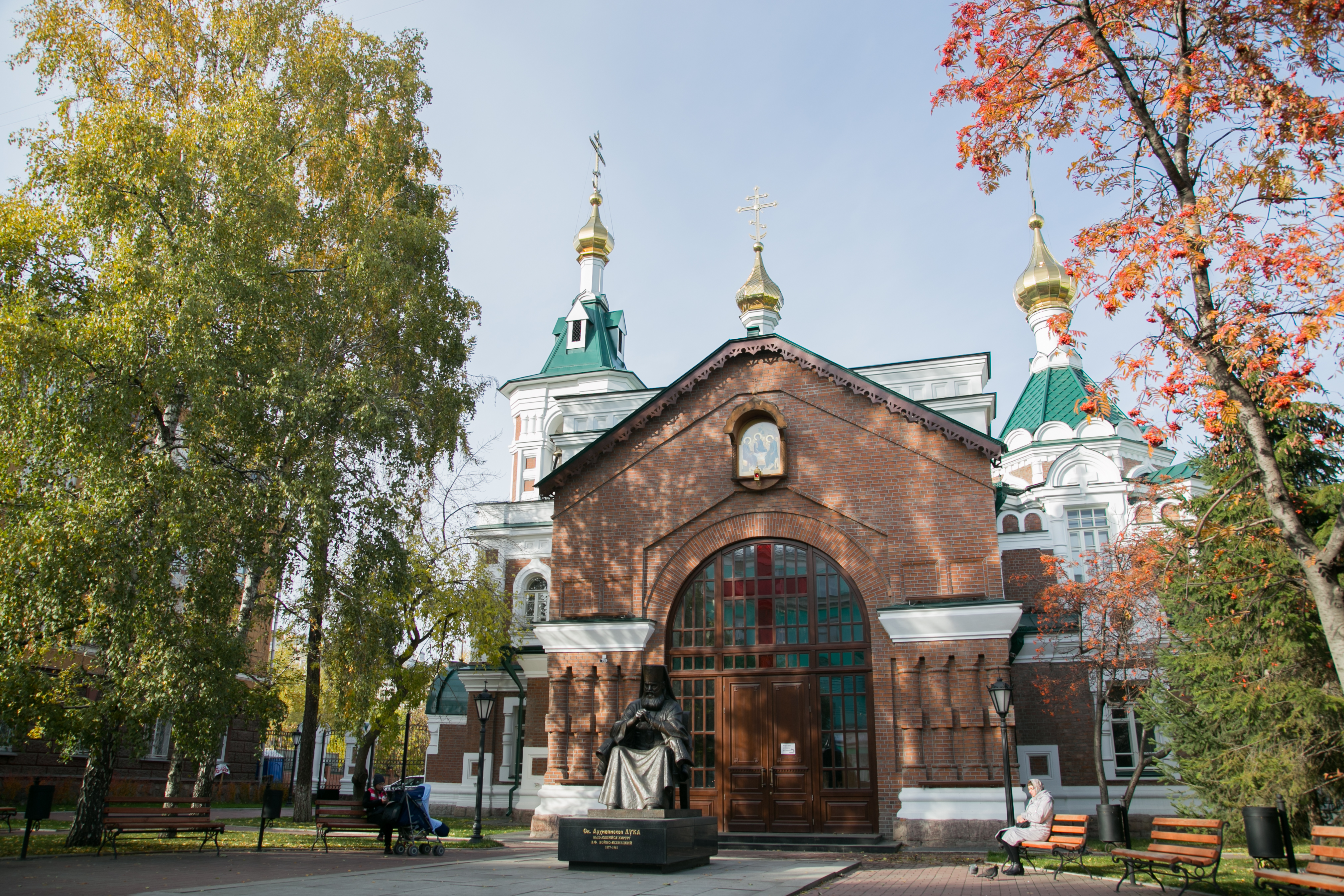 Храм св. Иоанна Предтечи с памятником святителю Луке (Войно-Ясенецкому)